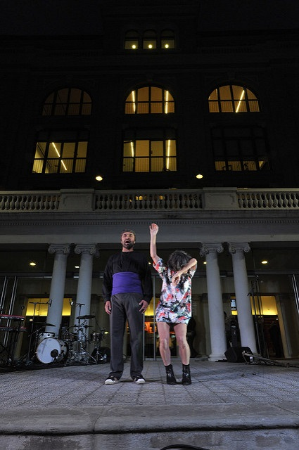 L'espectacle "A vore", durant la Fira Mediterània de Manresa 2015